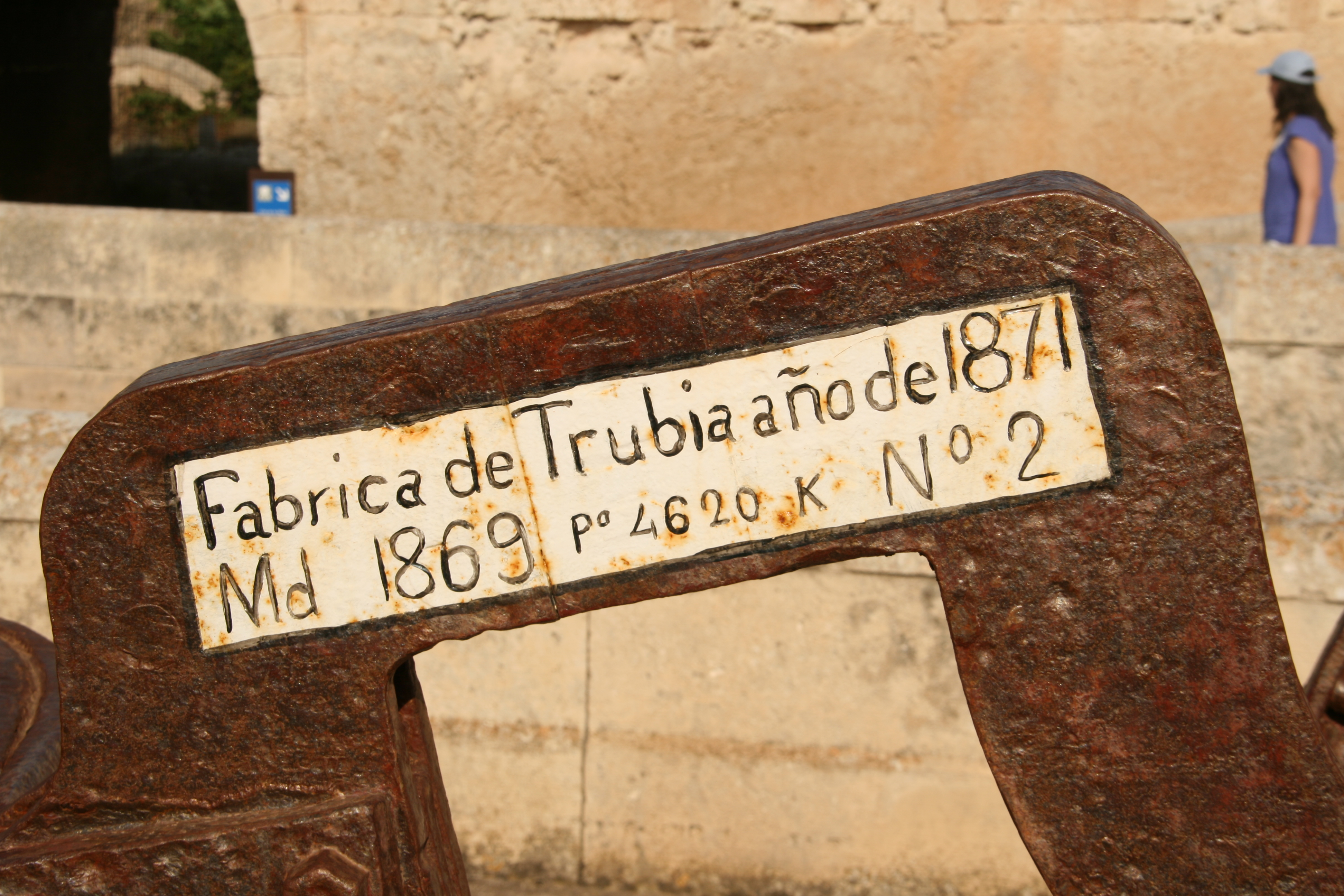 Trinquival fabricado en 1871 en Trubia (tenía por objeto transportar piezas de artillería pesadas y voluminosas. Está situada junto a la entrada a las galerías subterráneas de la fortaleza de Isabel II o de La Mola, en Menorca